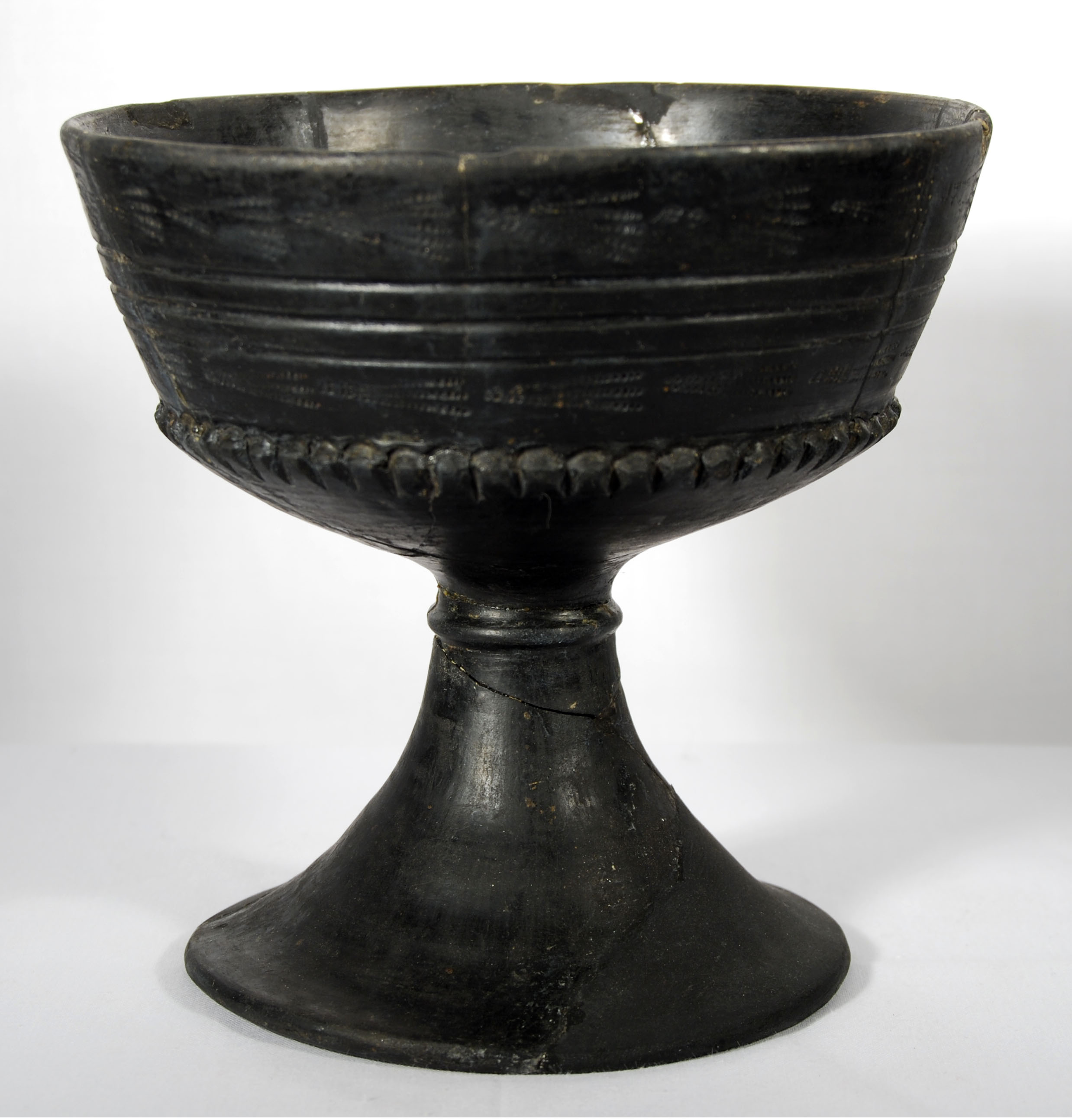 Calze etrusc de ceràmica de bucchero nero de peu acampanat amb decoració de ventalls tancats, de sis i tres fulles, formant dos frisos limitats per tres estries. Carena amb osques formant arcs. Segle VII-VI aC.